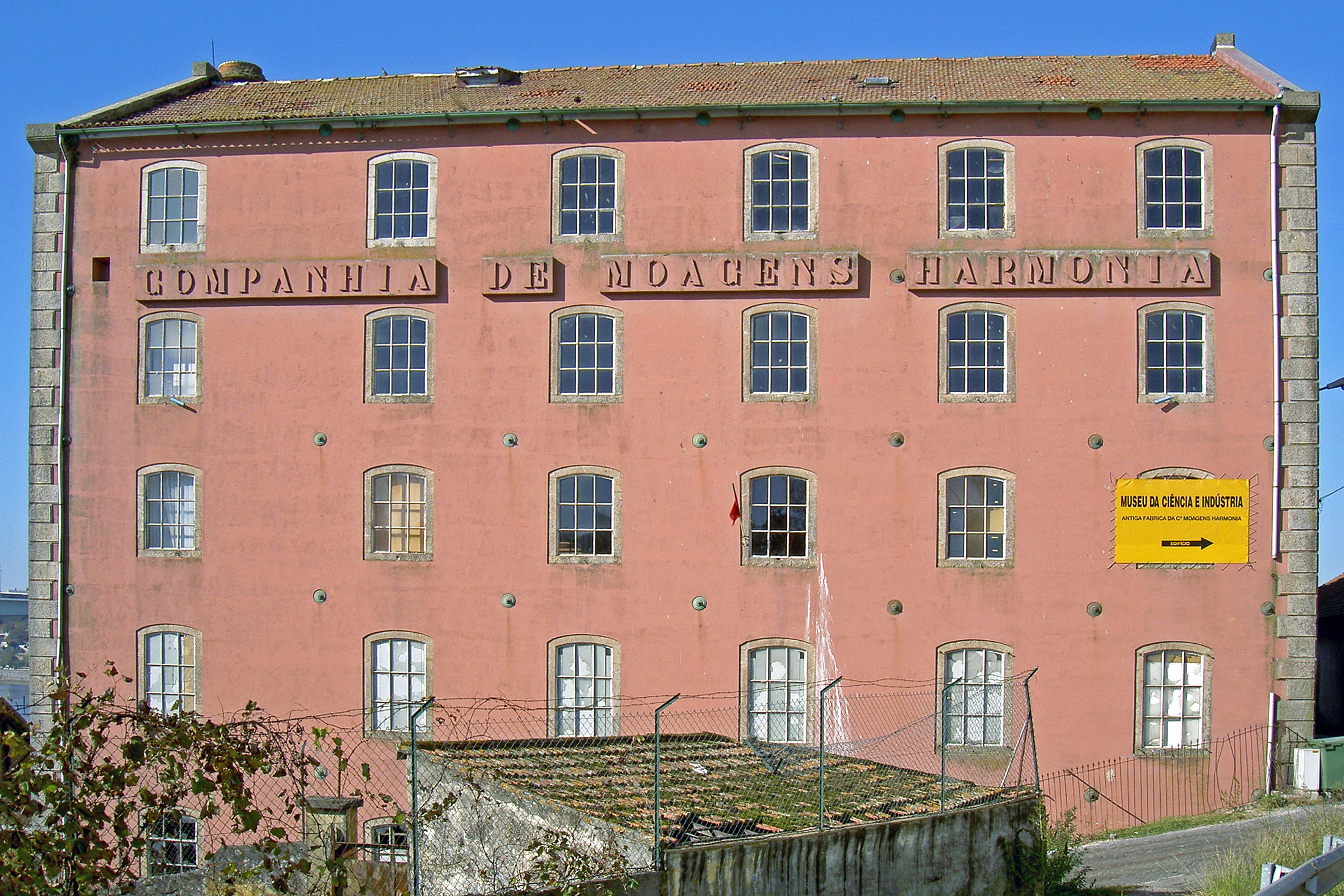 Companhia de Moagens Harmonia - Antes da remodelação para a Pousada do Freixo This file was uploaded for Wiki Loves Monuments in Portugal with the unique identifier 7109174.